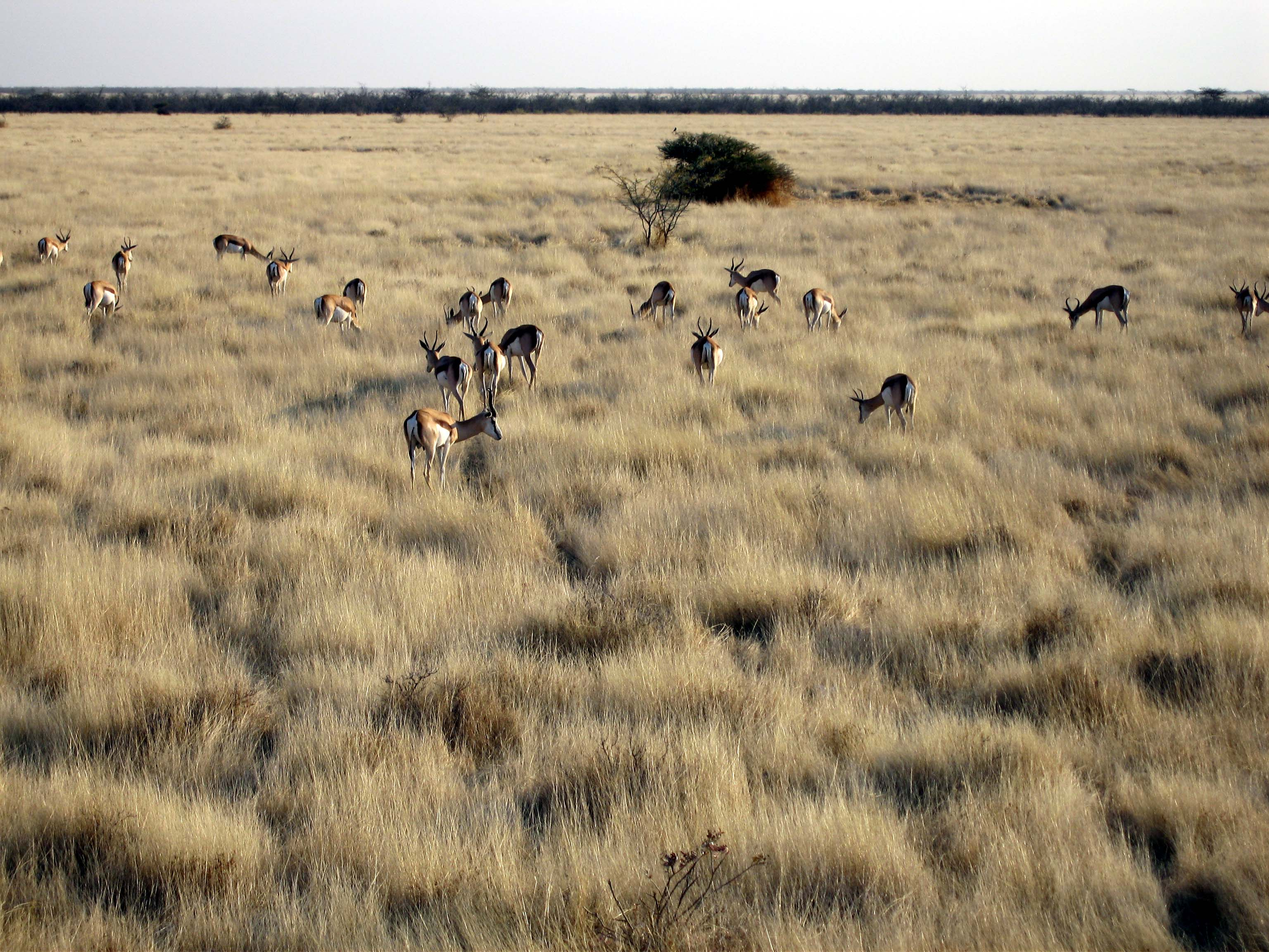 Gacelas en el Parque Nacional de Etosha